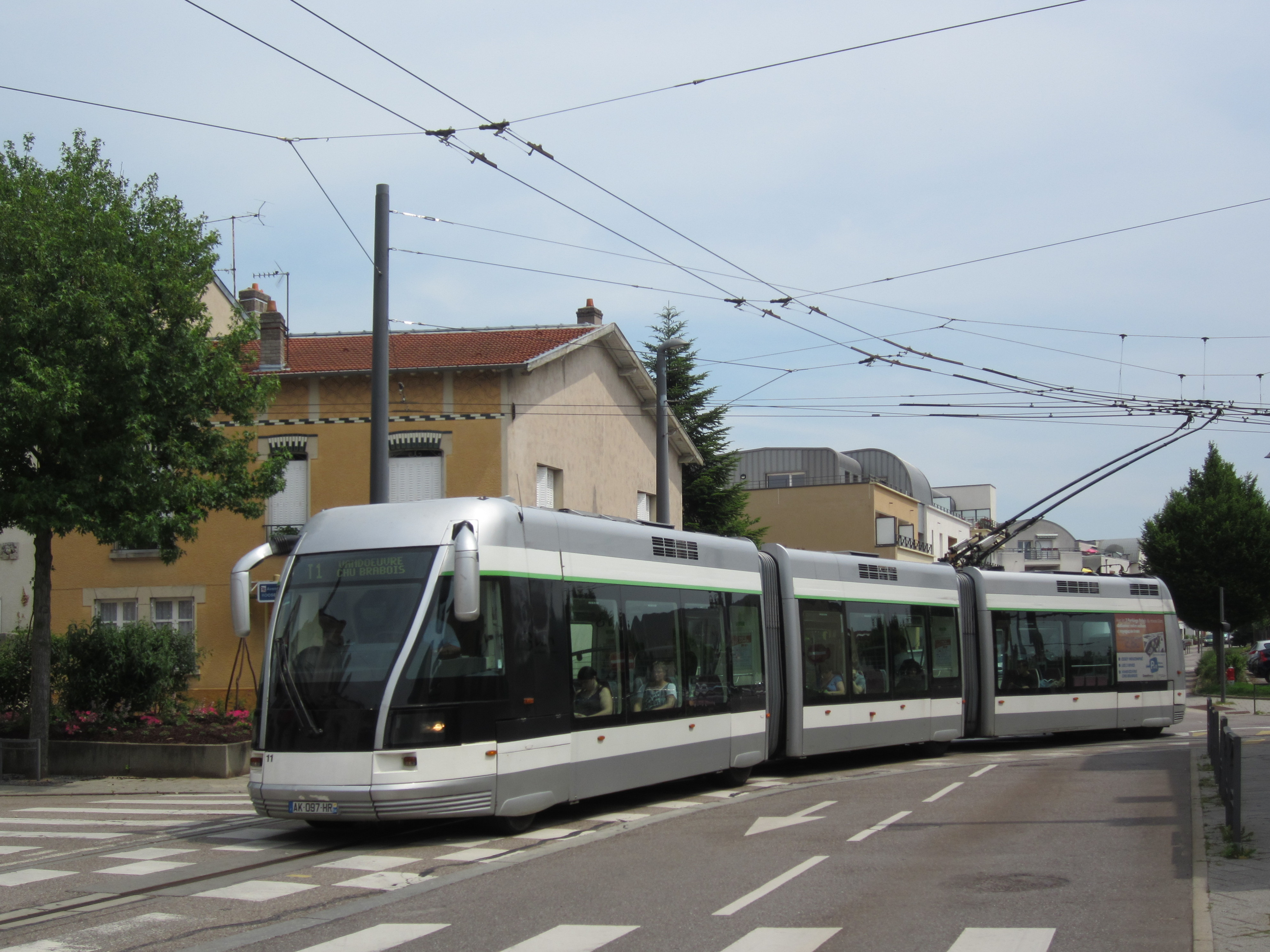 Bombardier TVR n°05 STAN sur la ligne T1, en approche de l'arrêt Essey Roosevelt, en direction de Vandoeuvre CHU Brabois.